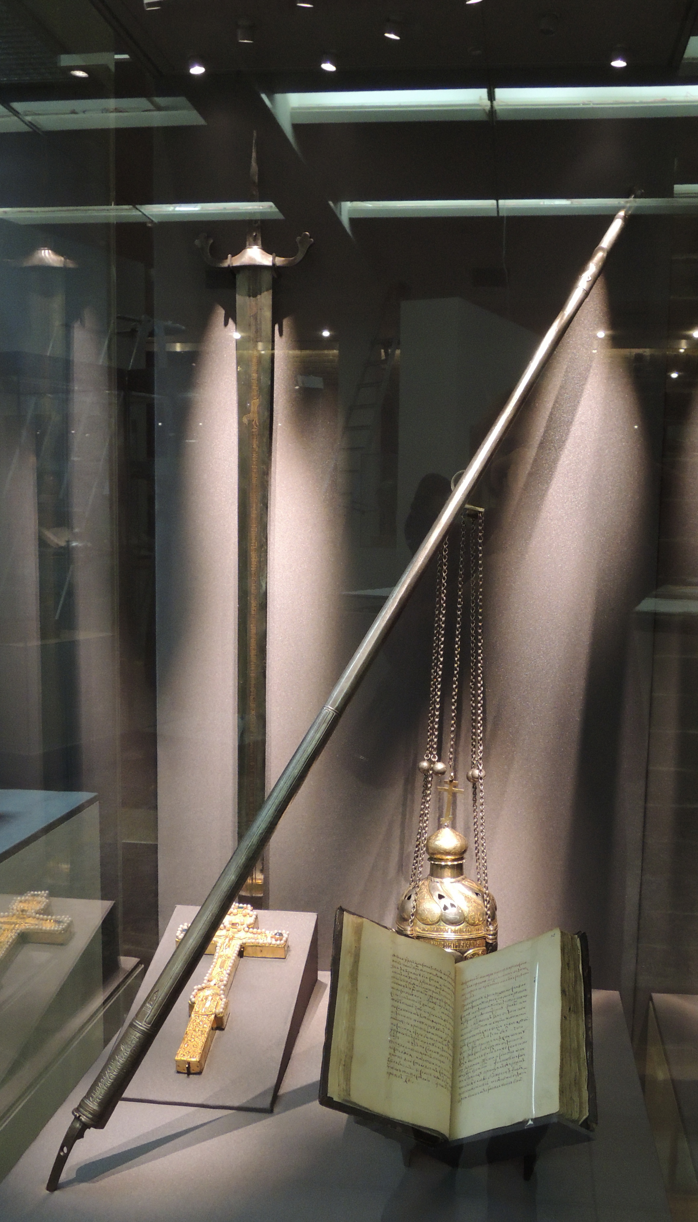 1. Пищаль И.М. Катырева-Ростовского. Турция. Конец 16 – начало 17 века. Железо, медь, серебро. ГИМ. На казенной части ствола серебром насечена русская надпись полууставом: «Лета ЗРКГ (1614) ноебря въи пiщаль кнзя Iвана Михаича Катырева Ростовского дело Лобрика (или «Добрика») Тигльс… мастера». В 1614 году Катырев-Ростовский был назначен первым воеводою большого полка в Тулу, возможно, там была изготовлена для него пищаль со стволом турецкой работы. 2. Кадило. Россия. 1629. Серебро, позолота, чеканка, резьба. ГИМ. Вклад боярина Ивана Александровича Колтовского (ум. после 1627) в Троицкий Белопесоцкий монастырь. Троюродный племянник Анны Колтовской, 4-й жены Ивана Грозного. Оличился в боях против поляков во время Московского восстания 1611 года. Был патриаршим боярином при Филарете. 3. Палаш. Россия. 17 век. Сталь, золотая всечка, дерево, кожа. По полотну клинка надпись: «ПОЛАШЪ ИВАНА ВАСИЛЬЕВИЧА [И]ЗМАЙЛОВА…». ГИМ. Иван Васильевич Меньшой Измайлов (ум. ок. 1630) – с воцарением Лжедмитрия I оказался в его ближайшем окружении. После смерти самозванца – стольник Василия Шуйского. После свержения его – был окружным оружничим при «дворе» королевича Владислава. В 1612 году участвовал в Втором ополчении. Надпись на палаше, возможно, была сделана в период, когда Измайлов в чине оружничего отвечал за царскую оружейную казну, а также за изготовление и закупку оружия. 4. Крест напрестольный. Ярославль. 1630. Золото, изумруд, сапфир, жемчуг, шпинель, дерева, чеканка, резьба (гравировка), канфарение. Ярославский музей-заповедник. Вклад в Ярославский Спасский монастырь И.Т. Грамотина. 5. Летописная книга. 17 век. Одно из подробных и последовательных описаний событий Смутного времени. Авторство приписывается И.М. Катыреву-Ростовскому, С.И. Шаховскому, И.А. Хворостинину, и др.